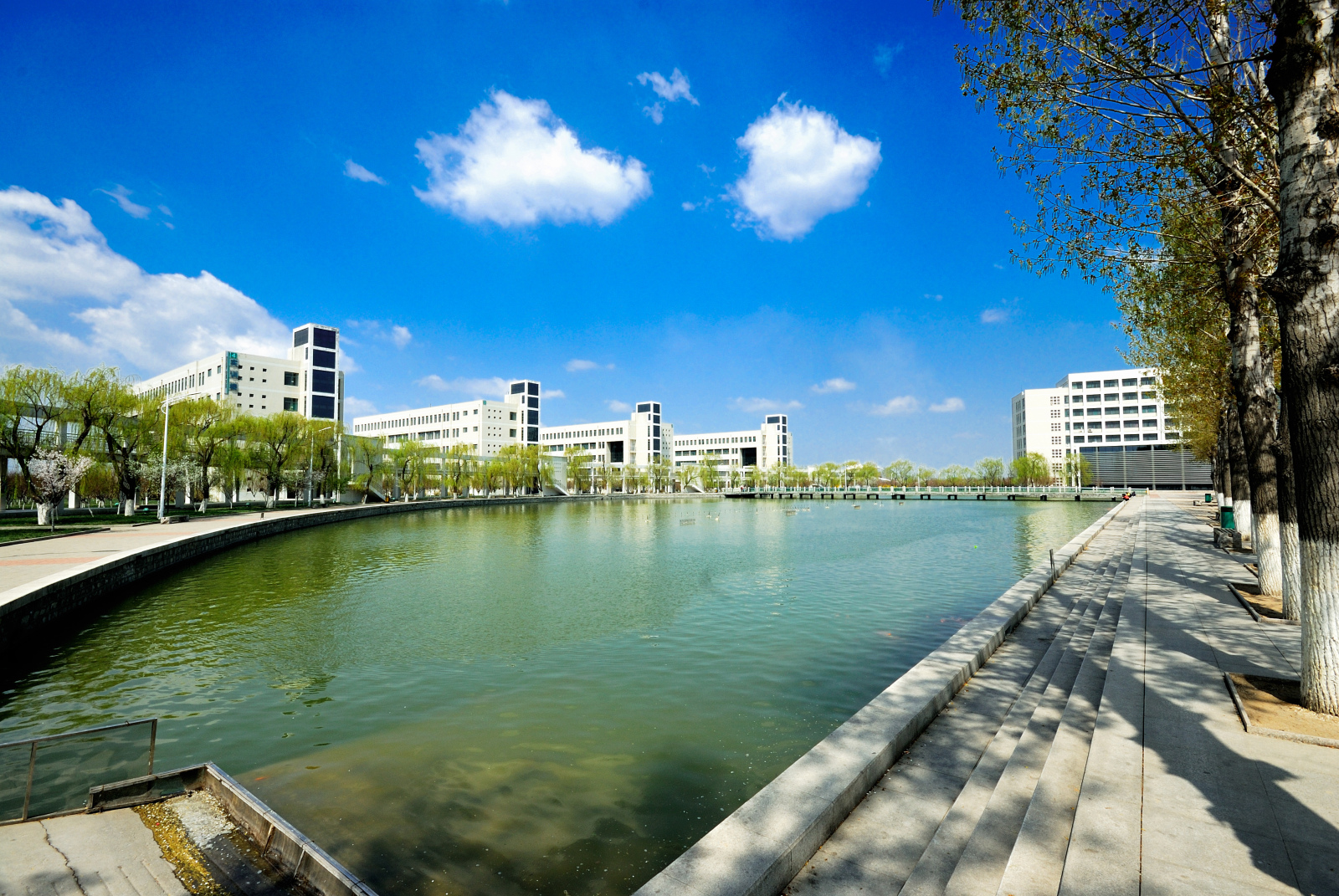 西校园西湖